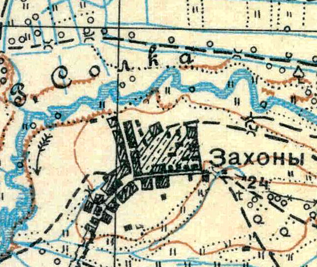 Топографическая карта Ленинградской области, квадрат О-35-21-Г-б (Калмотка), деревня Захонье-1.